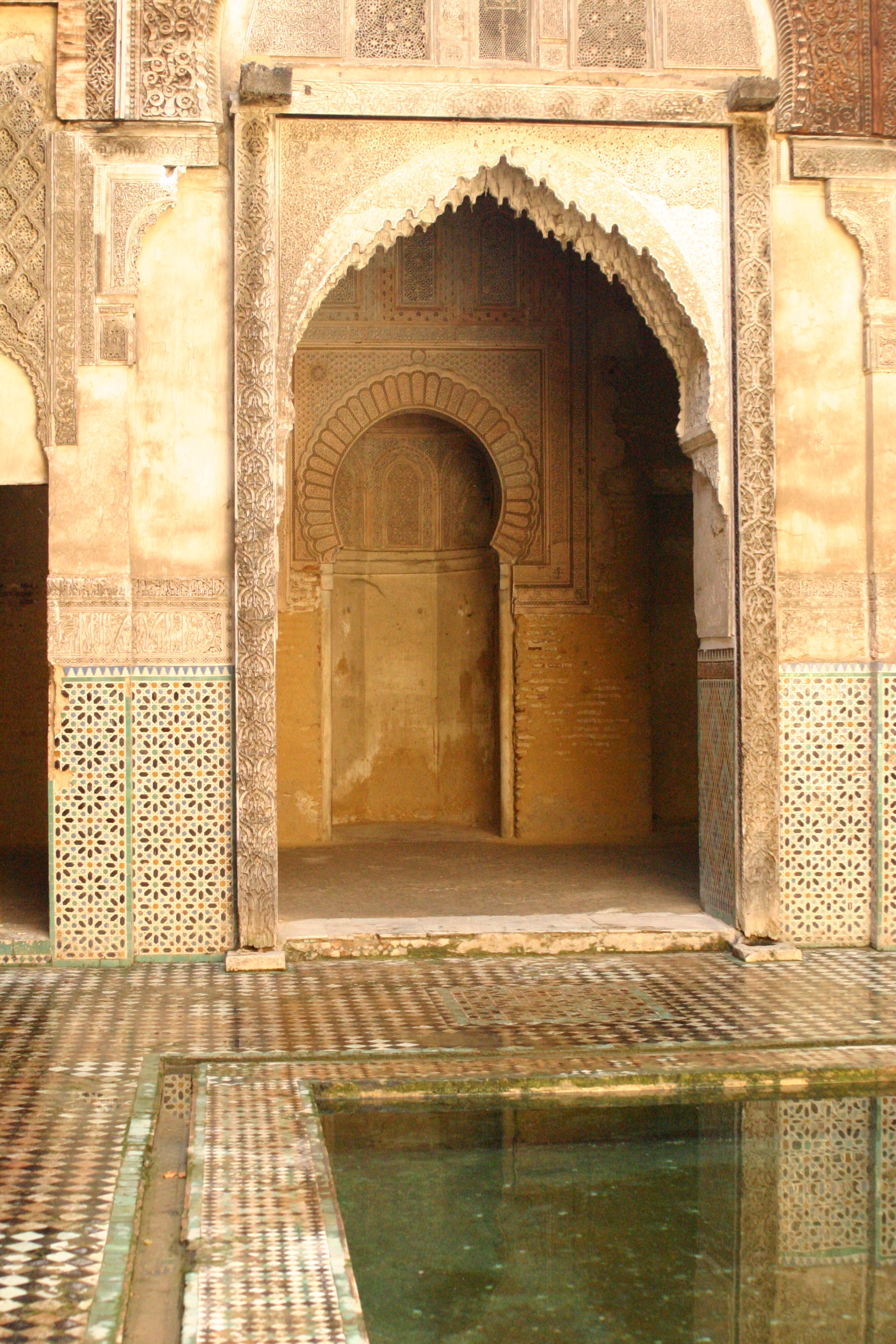 Madrasa as-Sahrij, Fes.